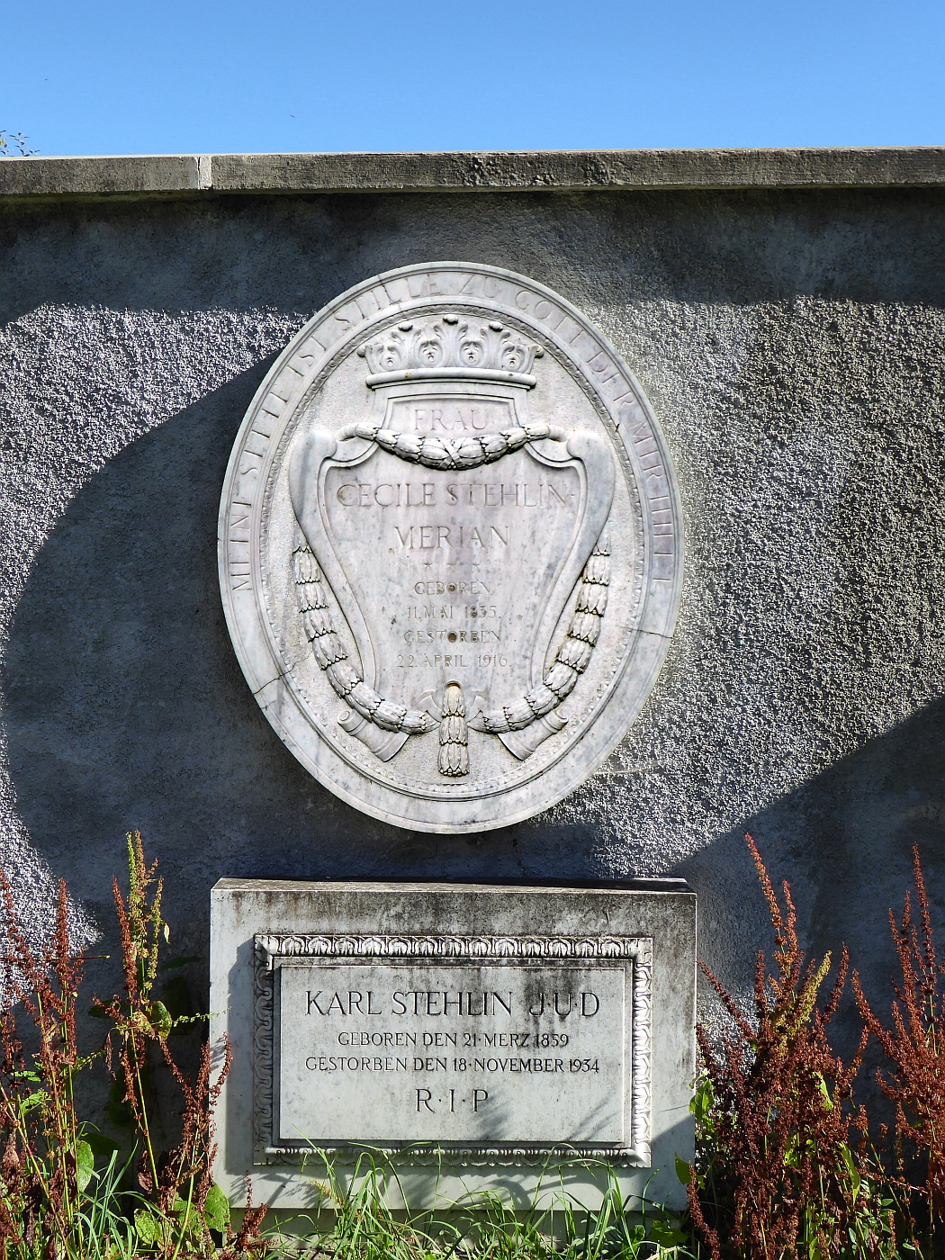 Karl Friedrich Stehlin (1859-1934) Jurist, Archäologe, Historiker, Politiker. Mutter Cécile Stehlin-Merian (1835-1916) Grab auf dem alten Friedhof von Arlesheim, Basel-Land